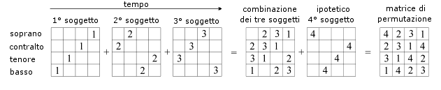 Lo schema della "Fuga a 3 Soggetti" tratta da "L'Arte della Fuga" BWV 1080 di Johann Sebastian Bach, secondo la ricostruzione del musicologo Zoltán Göncz.